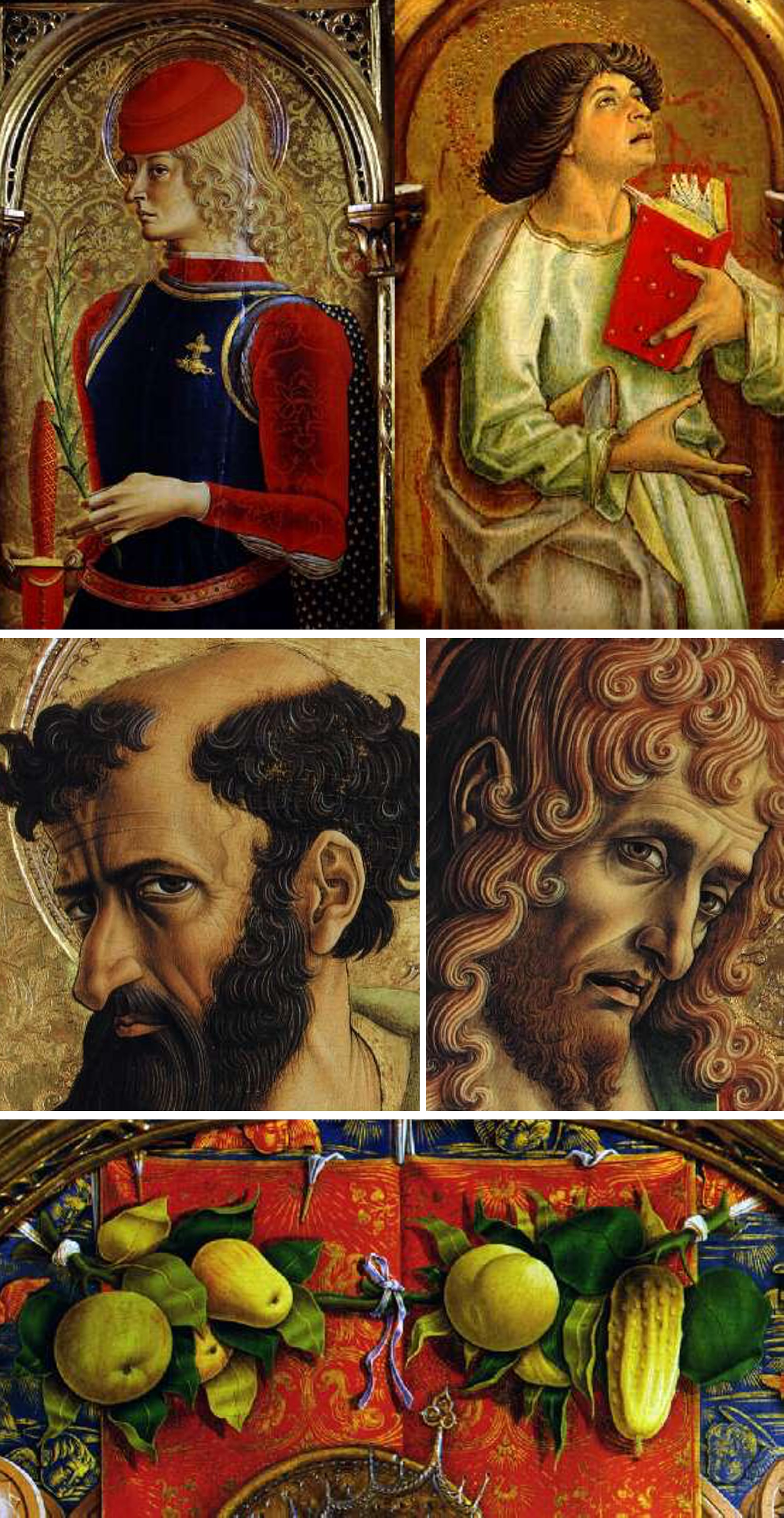 mise en page de photos d’ sur wiki commons